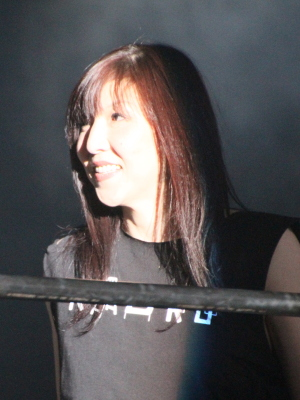 2014年3月22日大田区総合体育館